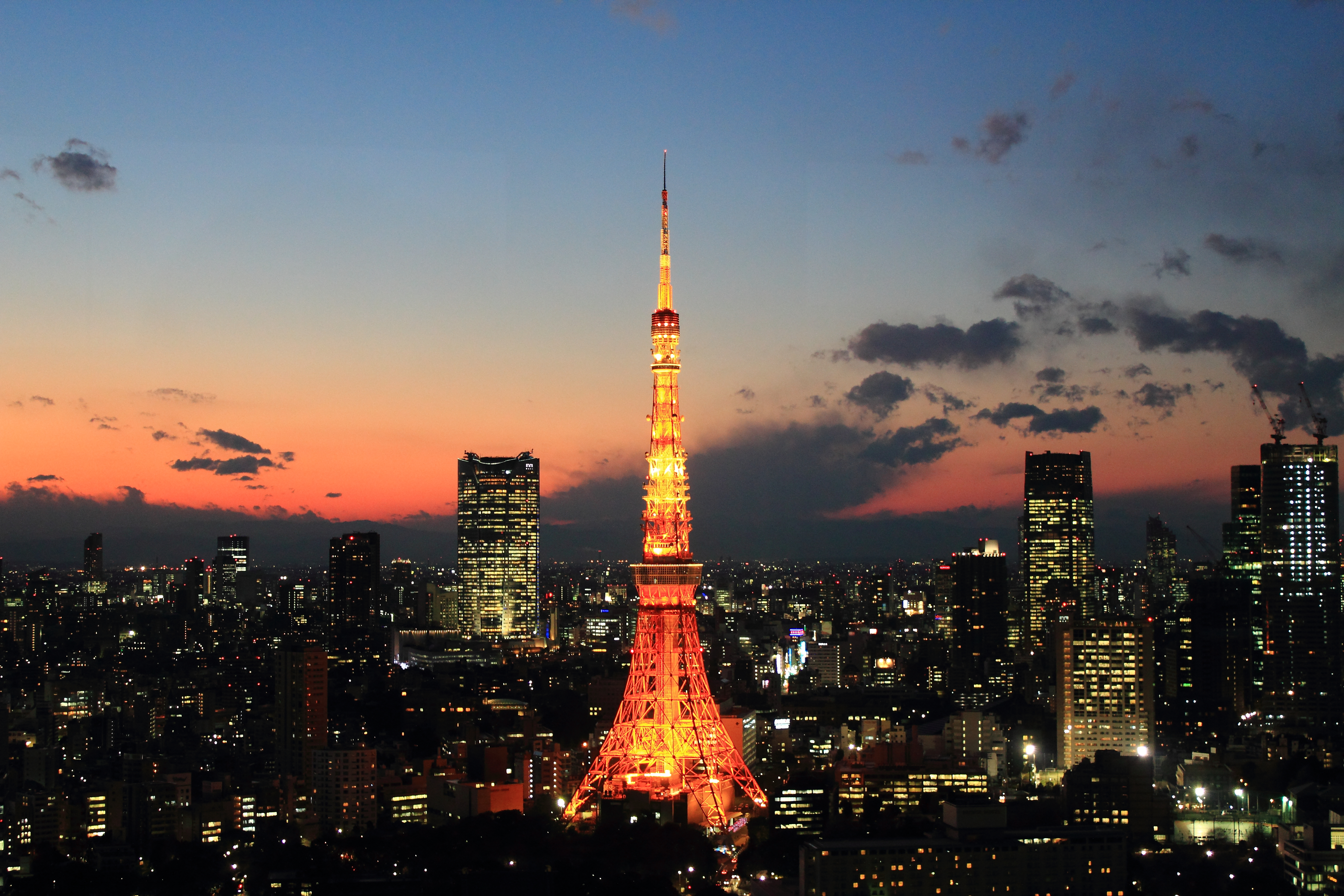 東京タワー夕暮れ（浜松町貿易センタービルより）